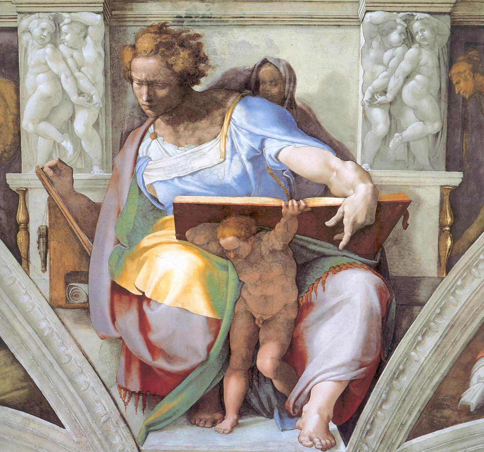 Пророк Даниил, Роспись свода Сикстинской капеллы (The Prophet Daniel from the Ceiling of the Sistine Chapel)